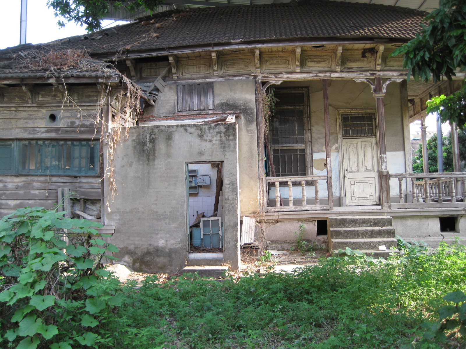 臺南市市定古蹟「原臺南廳長官邸」。